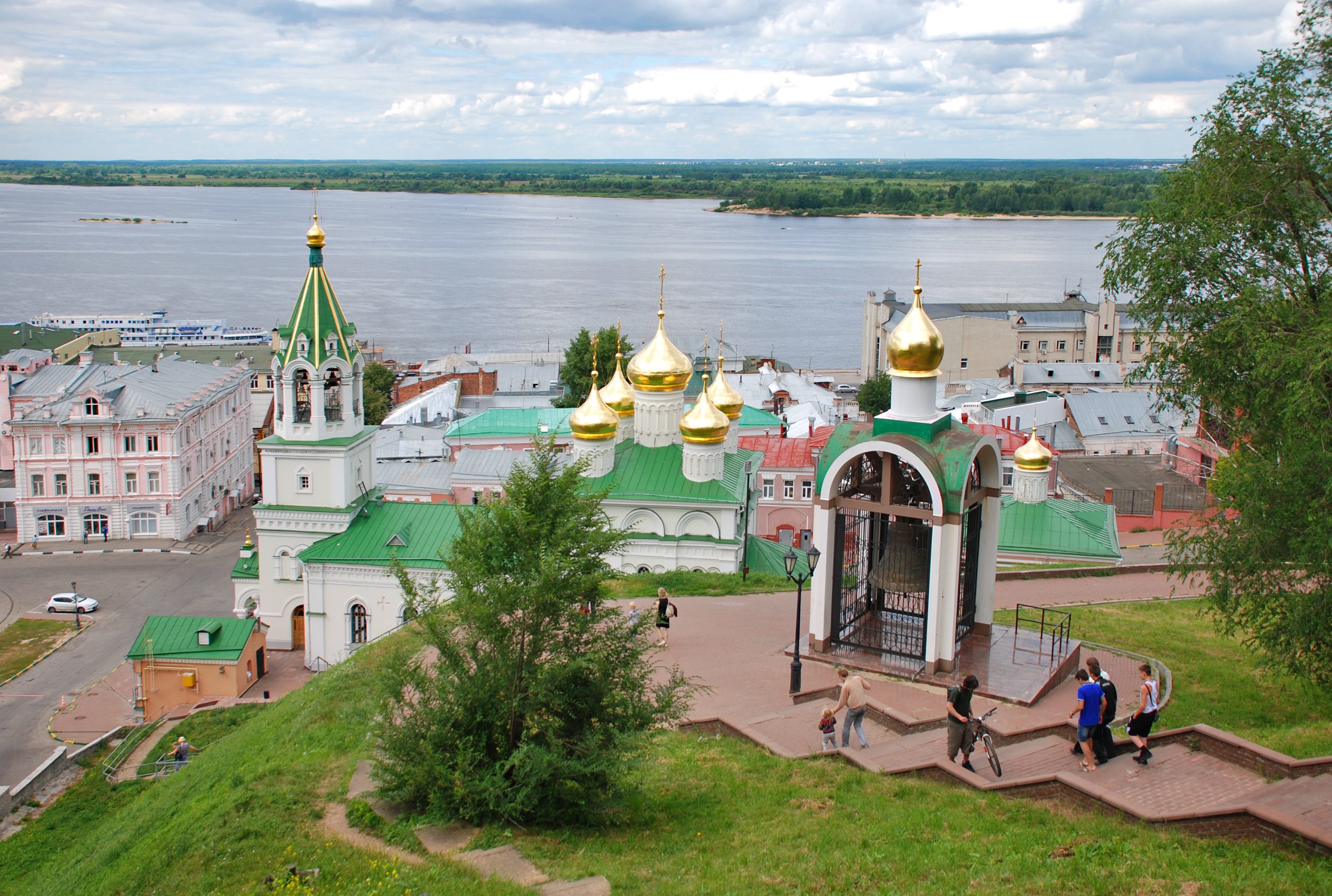 Ансамбль церкви Рождества Иоанна Предтечи (Нижегородская область, Нижний Новгород, Ивановский съезд, 1А, 1Б)